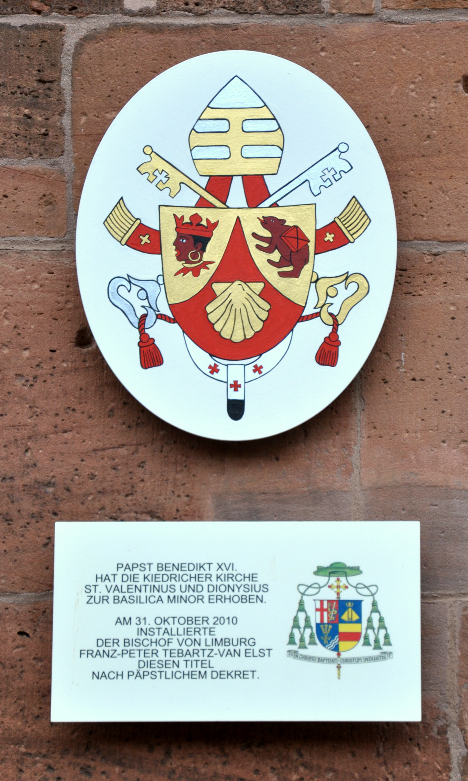 Kiedrich, Pfarrkirche St. Valentin, Papstwappen Benedikt XVI. und Erinnerungstafel zur Erhebung zur Basilica minor am 31. Oktober 2010 (mit Wappen des Limburger Bischofs Franz-Peter Tebartz-van Elst)